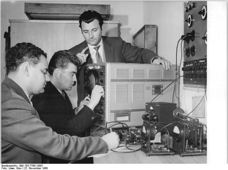 Dresden, Gaststudenten der TH Zentralbild Löwe 22.11.1960 Ausländische Studenten an der Technischen Hochschule Dresden. Zu den 423 ausländischen Studenten, die an der Technischen Hochschule in Dresden studieren, gehört Radwan Azm aus der Vereinigten Arabischen Republik. Er ist bereits im 7. Semester der Fachrichtung Elektrotechnik. UBz: Der Dozent für theoretische Wechselstromtechnik Dr.-Ing. Wunsch (rechts) unterstützt Radwan Azm (Außen links) und seinen deutschen Kommilitonen Wolfgang Fichtner bei einem Versuch im Wechselstrompraktikum im Institut für Wechselstromtechnik. Information added by Wikimedia users.